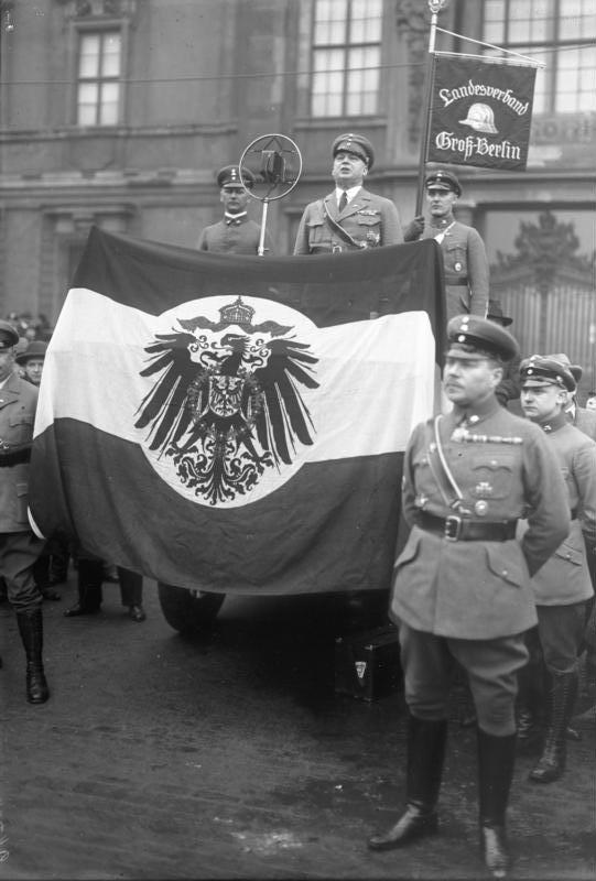 Der grosse Stahlhelmaufmarsch als Auftakt für das Volksbegehren im Lustgarten in Berlin! Der Bundesführer Stephani hält von der mit der alten Reichsflagge geschmückte Kanzel seine grossr Rede an die Stahlhelmer im Lustgarten.